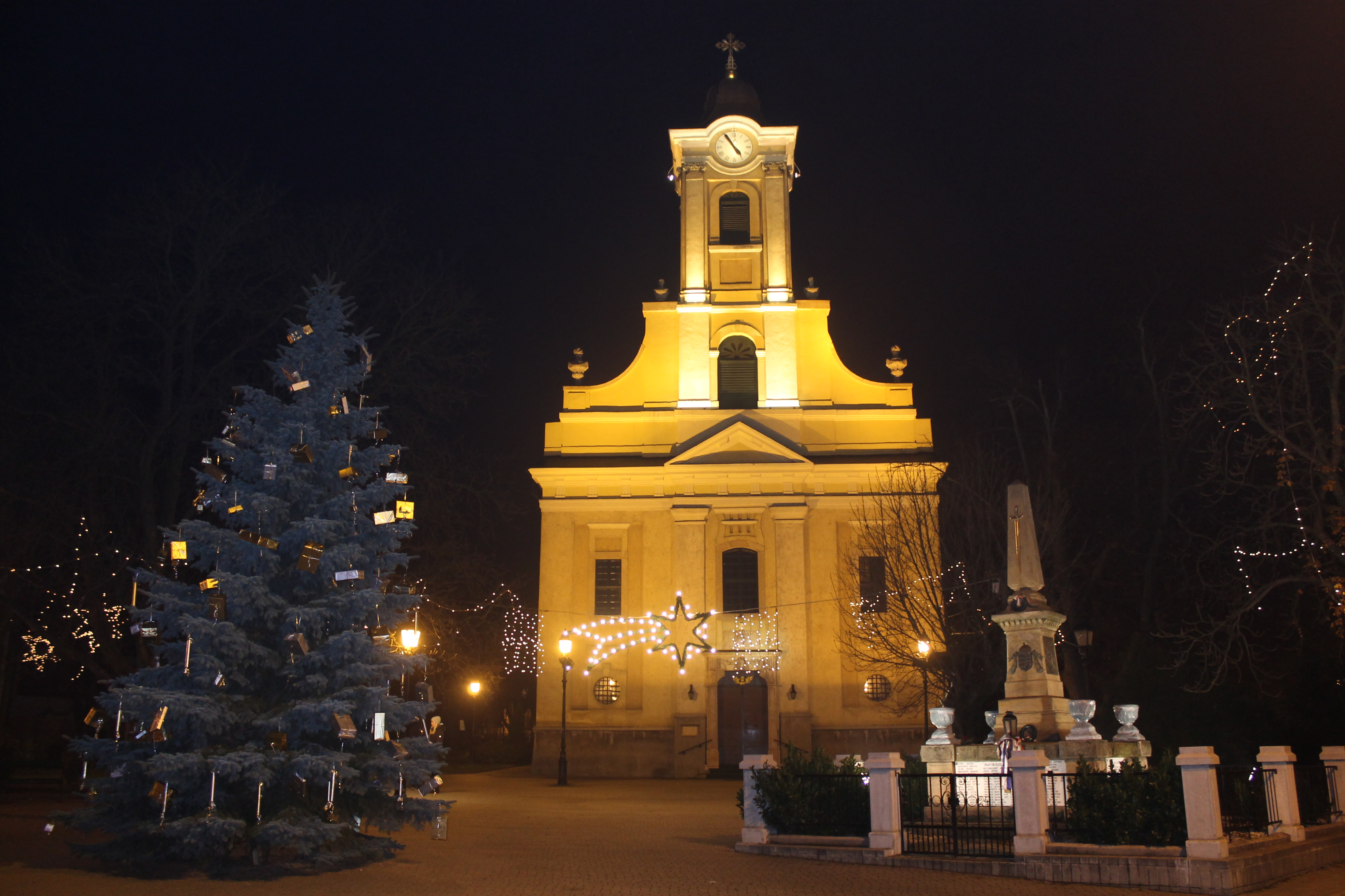 Solymár Templom tér éjjel